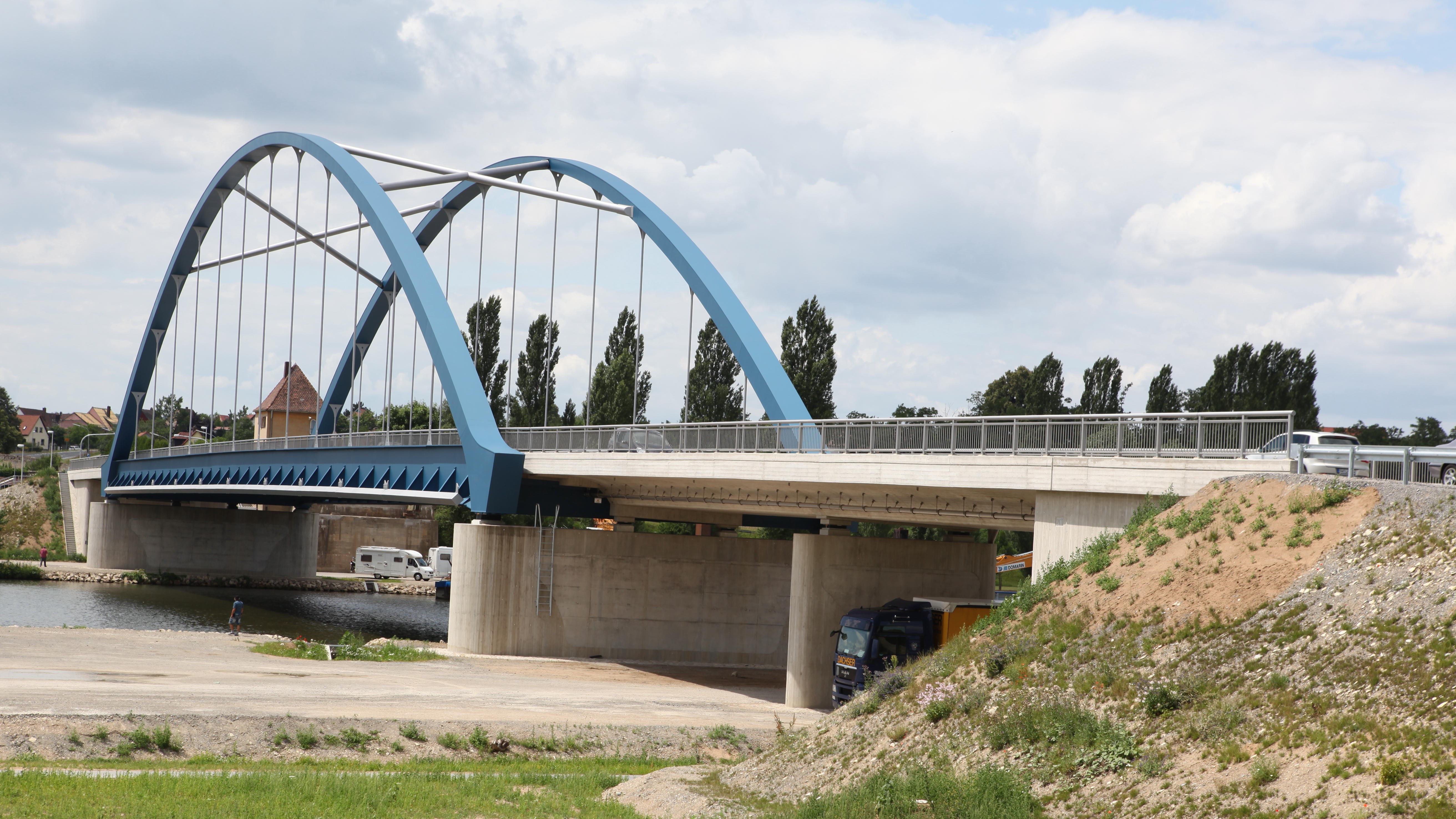 Mainbrücke in Volkach, Bayern